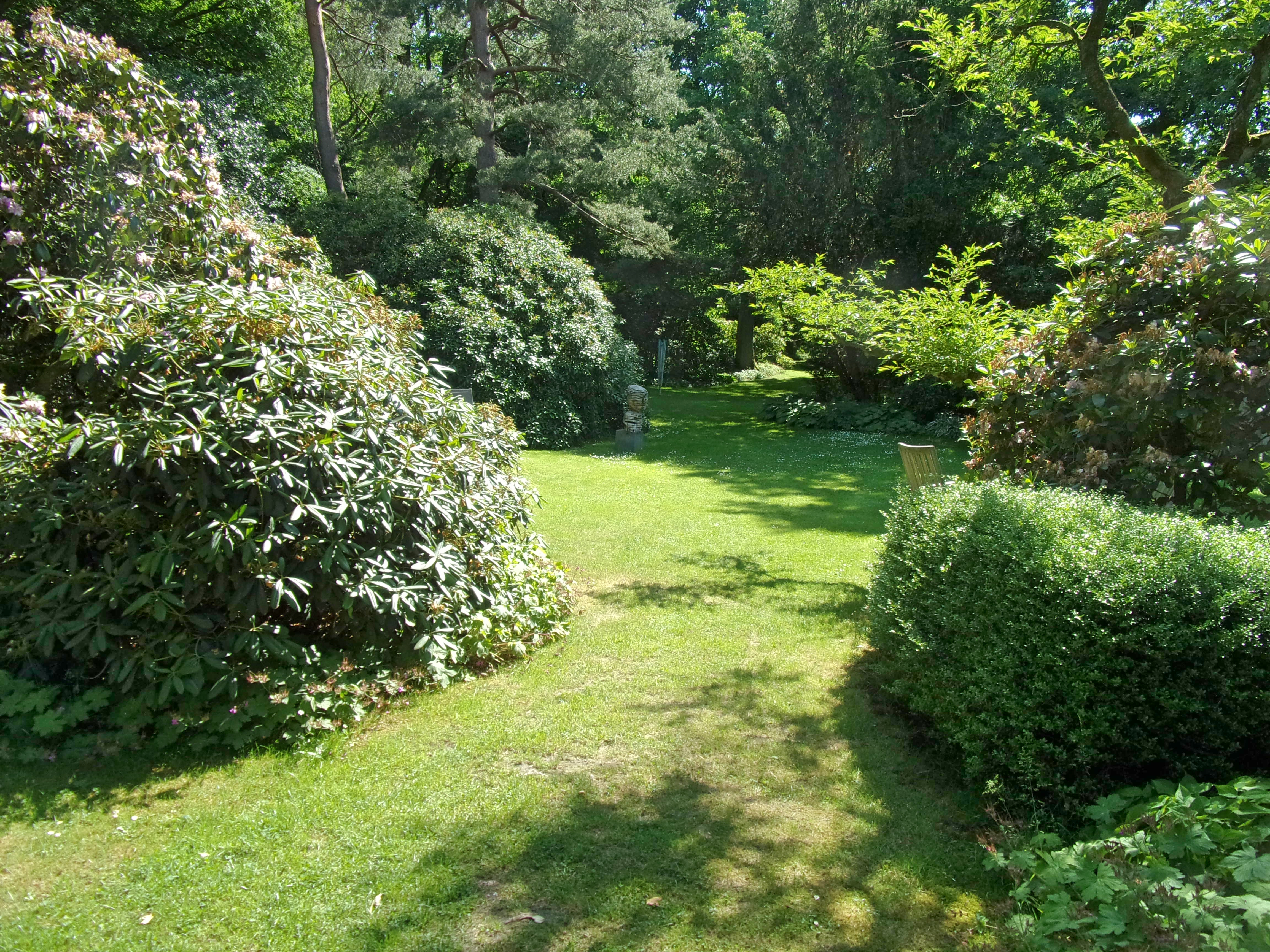 Der Lüttge-Garten in Hamburg-Lokstedt ist benannt nach dem Hamburger Gartenarchitekten Gustav Lüttge, der diesen Garten 1958 an seinem Wohnhaus anlegte und 1968 verstarb. Bäume, Rhododendren, Freiflächen und einige Wege sowie die Zucht von Rhododendren kennzeichnen den unter Denkmalschutz stehenden Garten. Der Verein " Freunde des Lüttge-Gartens in Hamburg-Lokstedt e.V. " betreut und pflegt den heutigen Garten und kümmert sich liebevoll um den Erhalt. Gustav Lüttge war bedeutender Gartenarchitekt und u. a. für den Alsterpark zur Gartenschau 1953 verantwortlich. Mehr Informationen zum Garten unter dem folgendem Link: This is a photograph of an architectural monument.